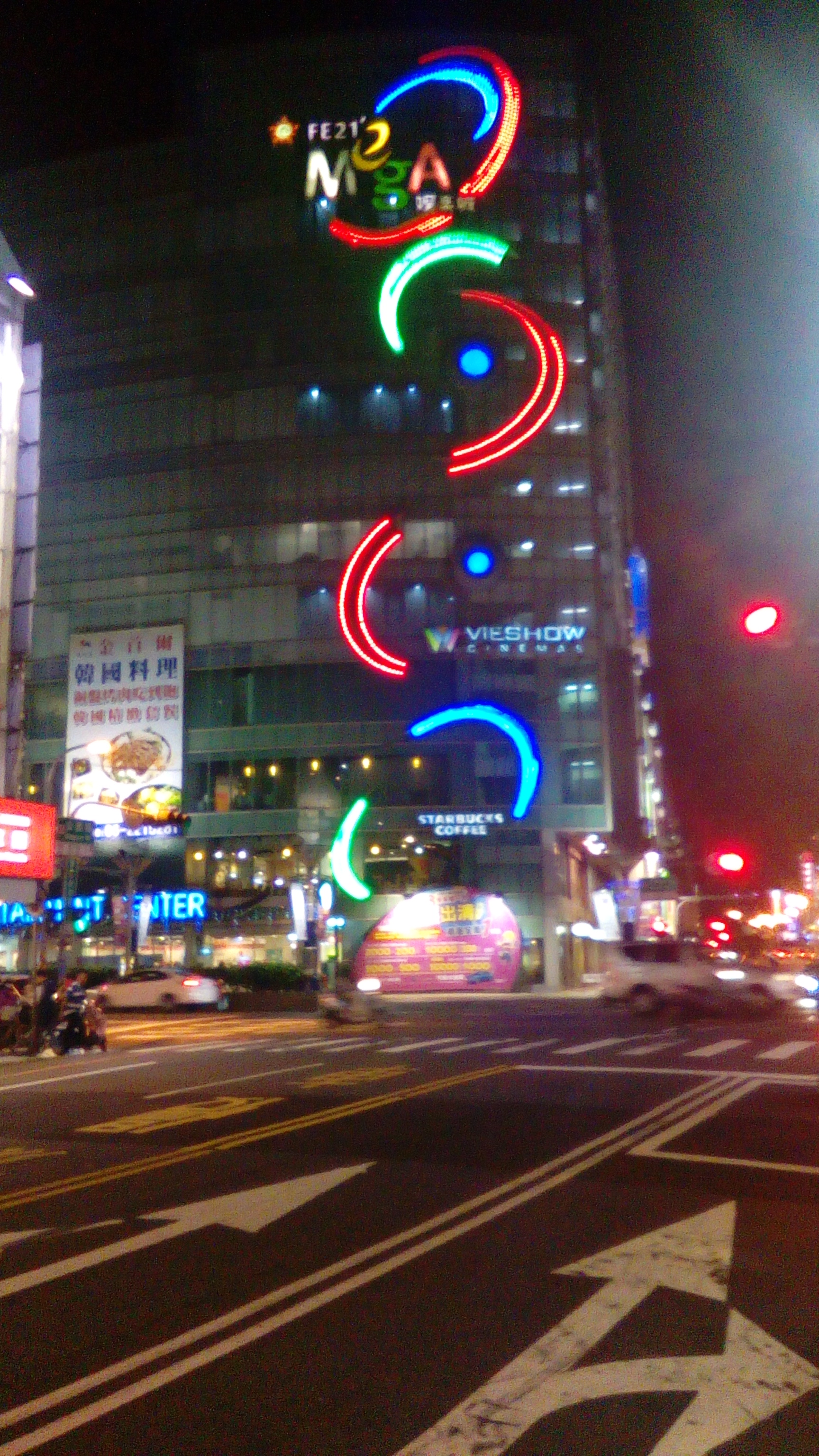 位於台南市中西區境內 公園路與民族路口